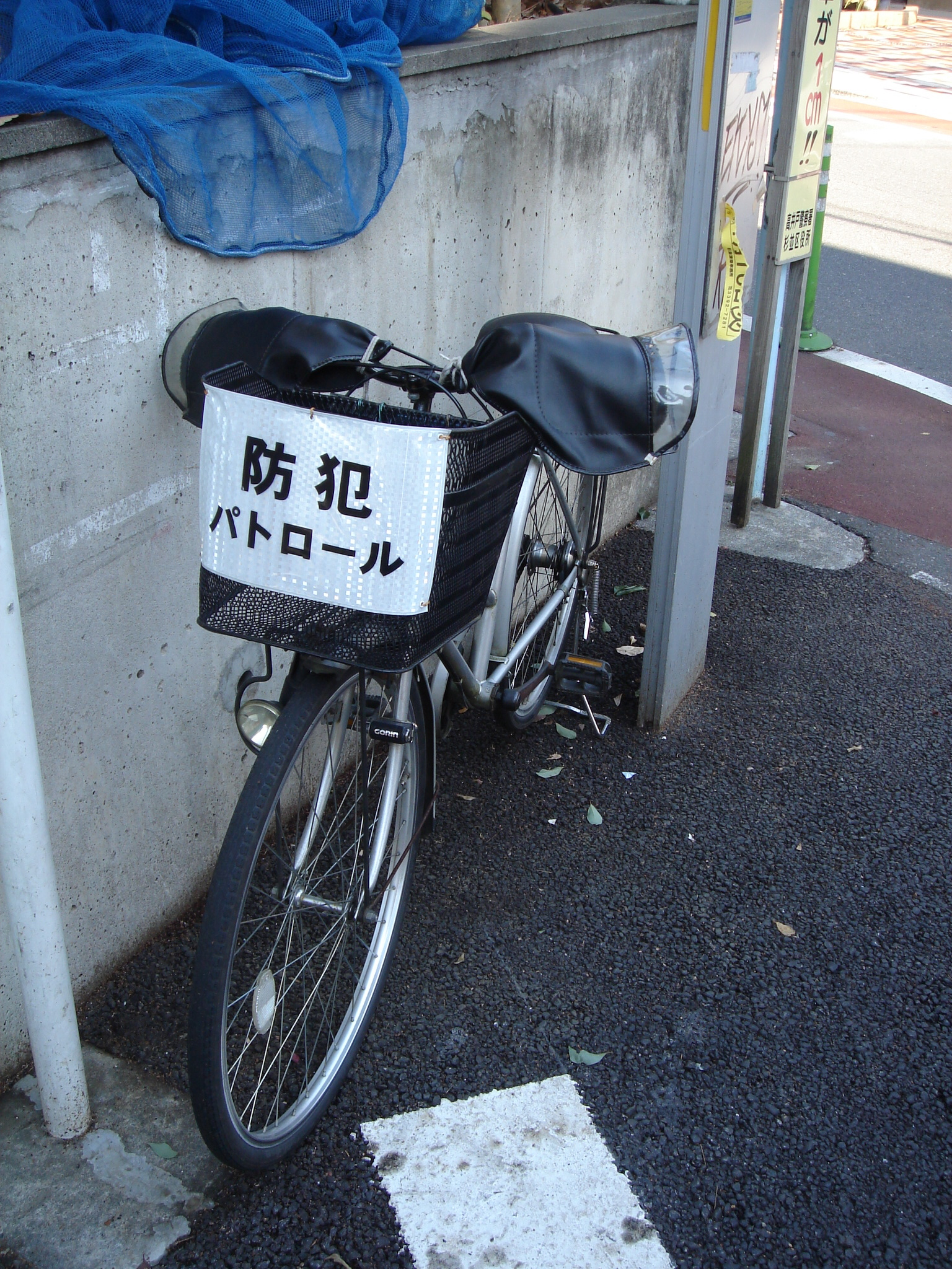 この自転車は防犯しなくて良いのか？